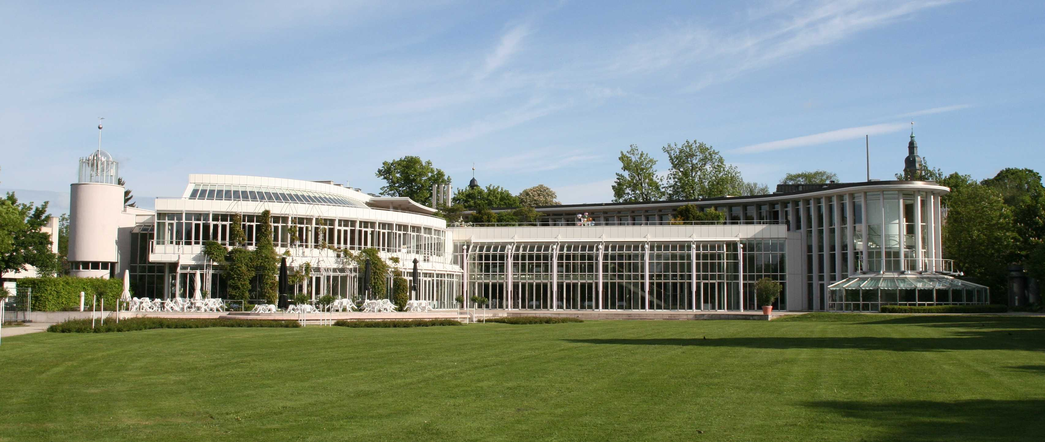 Kongresshaus in Coburg von Rosengarten aus gesehen Architekt:Busso von Busse